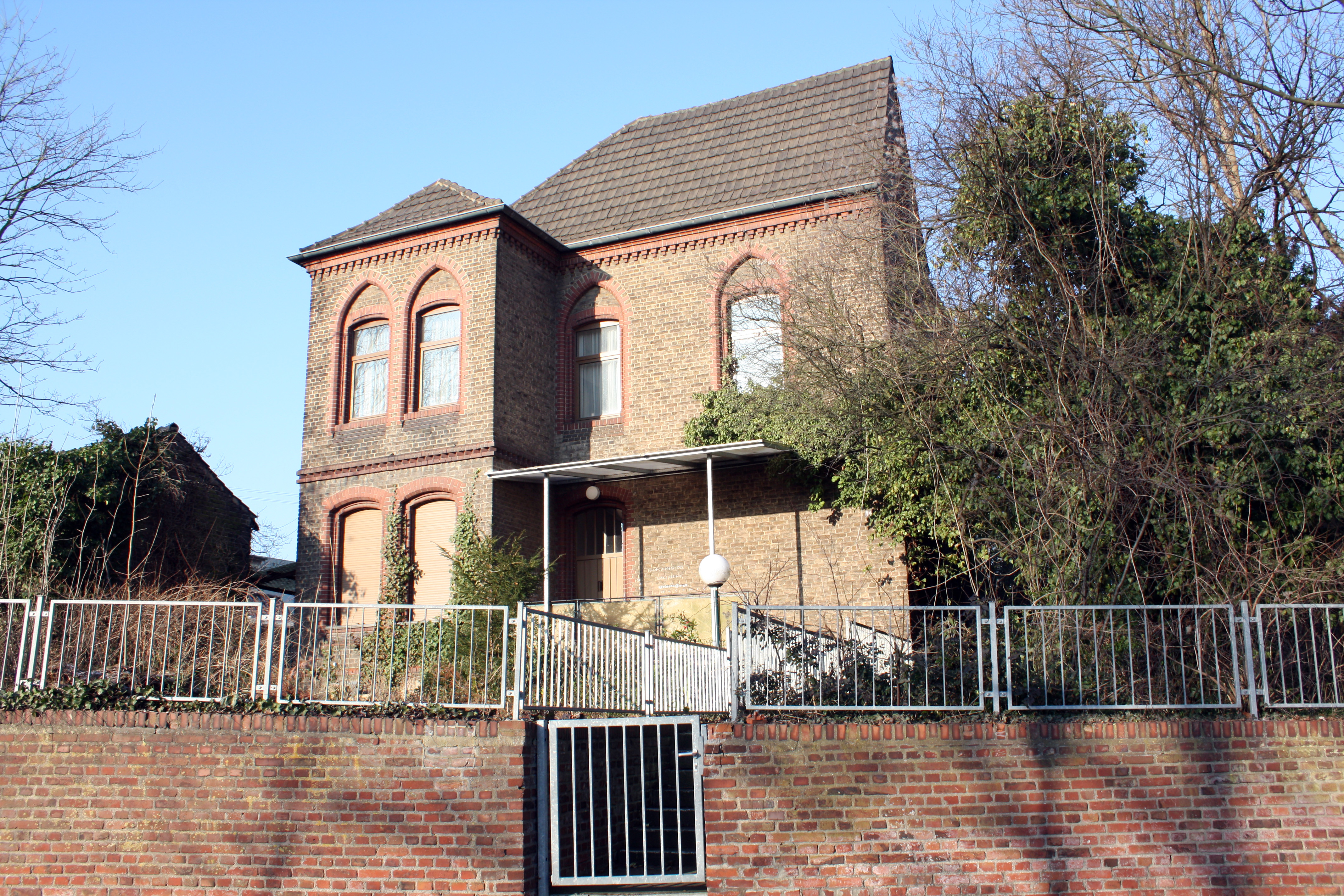 St. Johann Baptist Kendenich, altes Pfarrhaus